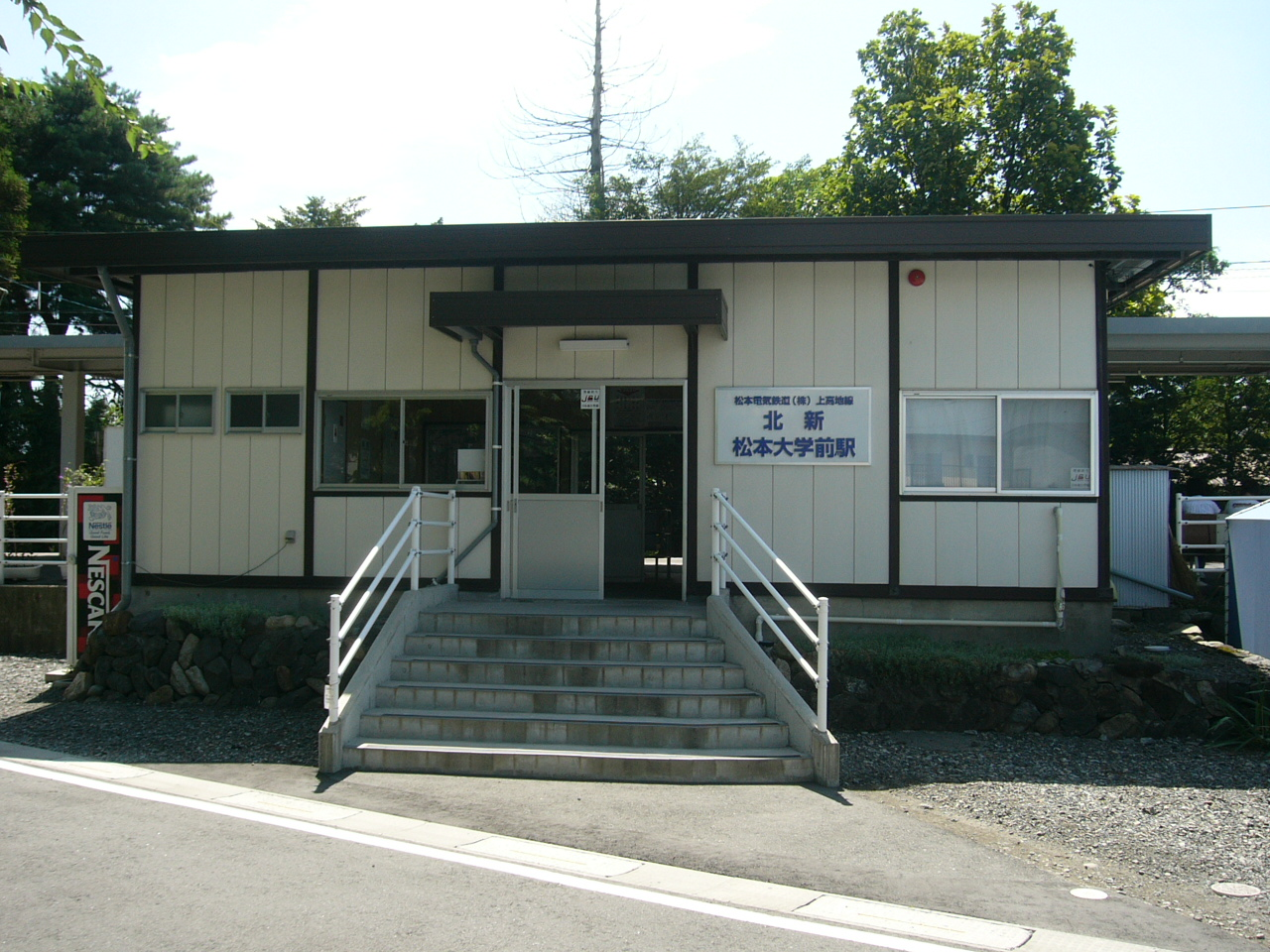 Kitanii-matsumotodaigakumae Station